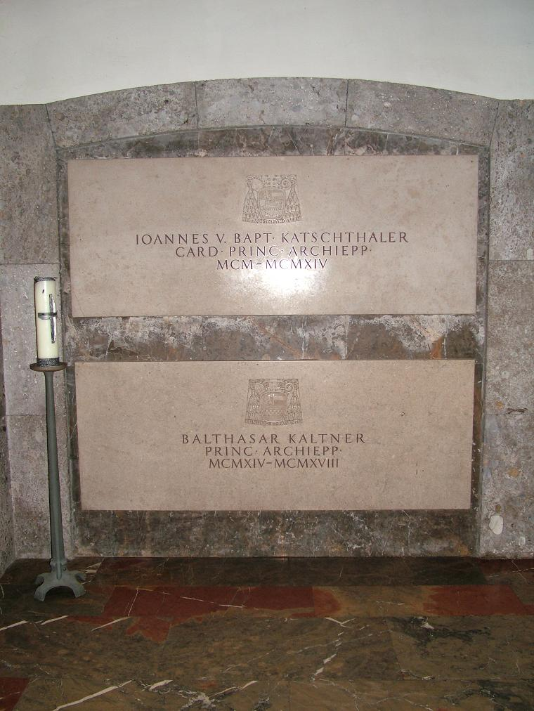 Grab Bischöfe Katschthaler und Kaltner